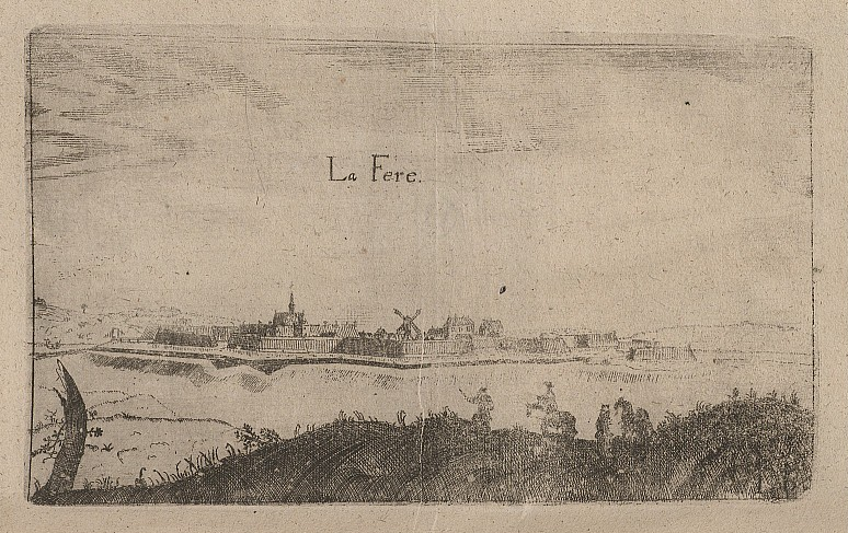 Original image description from the Deutsche Fotothek Architektur & Festungsbau